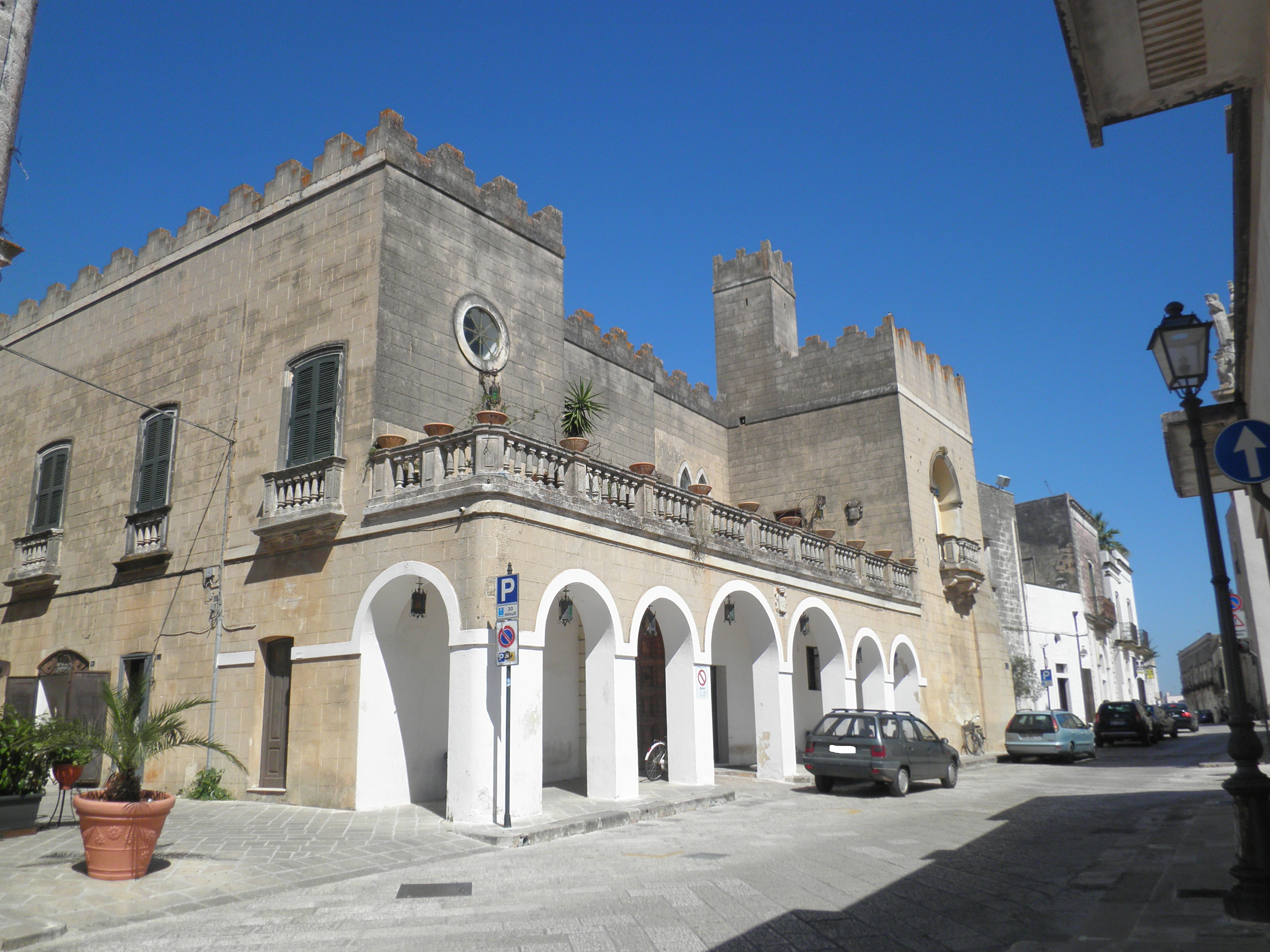 Palazzo Baroni Ripa